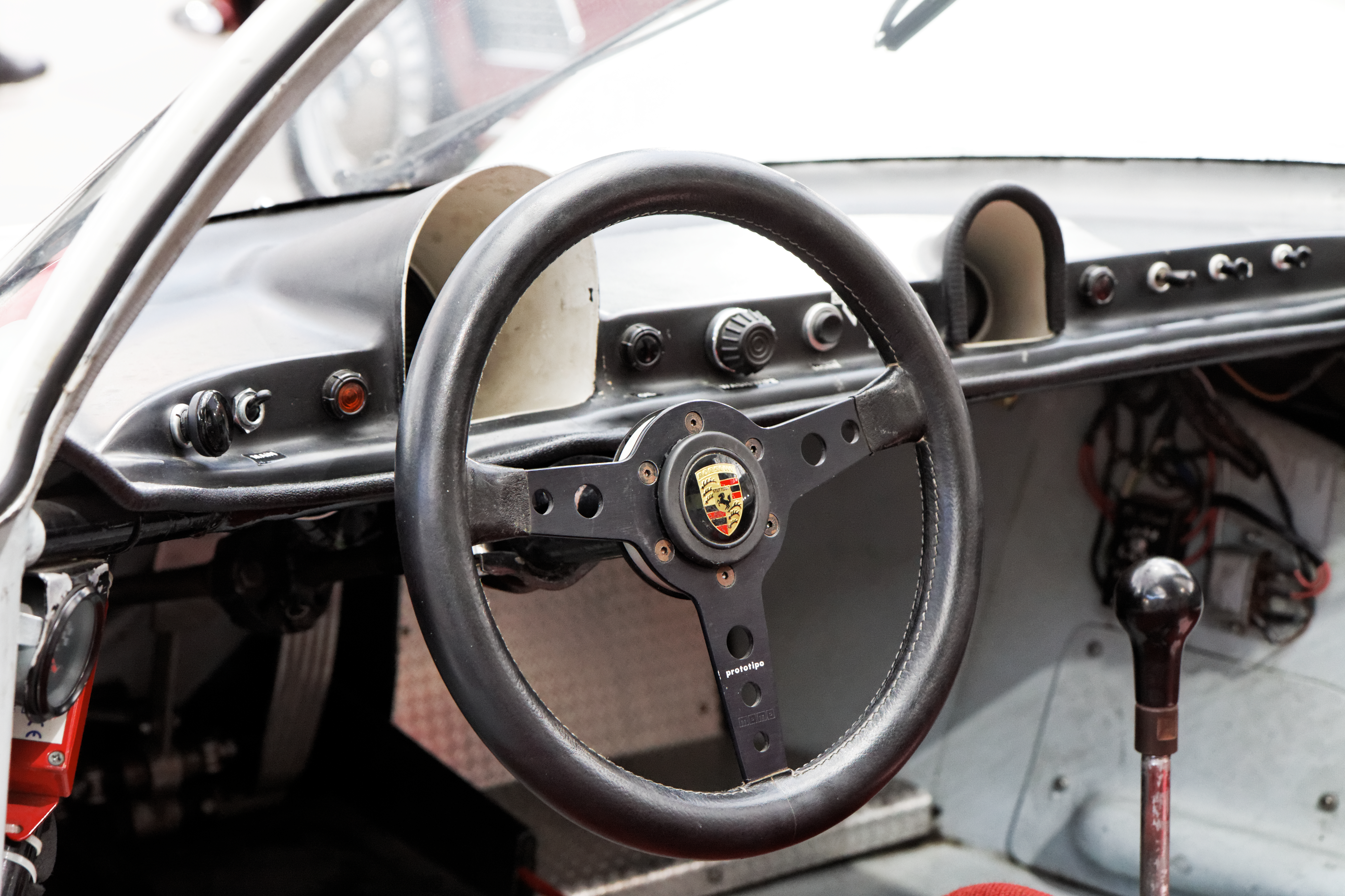 Une Porsche 906 Carrera coupé sport compétition de 1966.